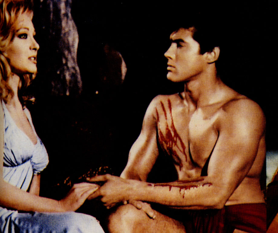 Maciste all'inferno, film 1962 de Riccardo Freda. (Screenshots)